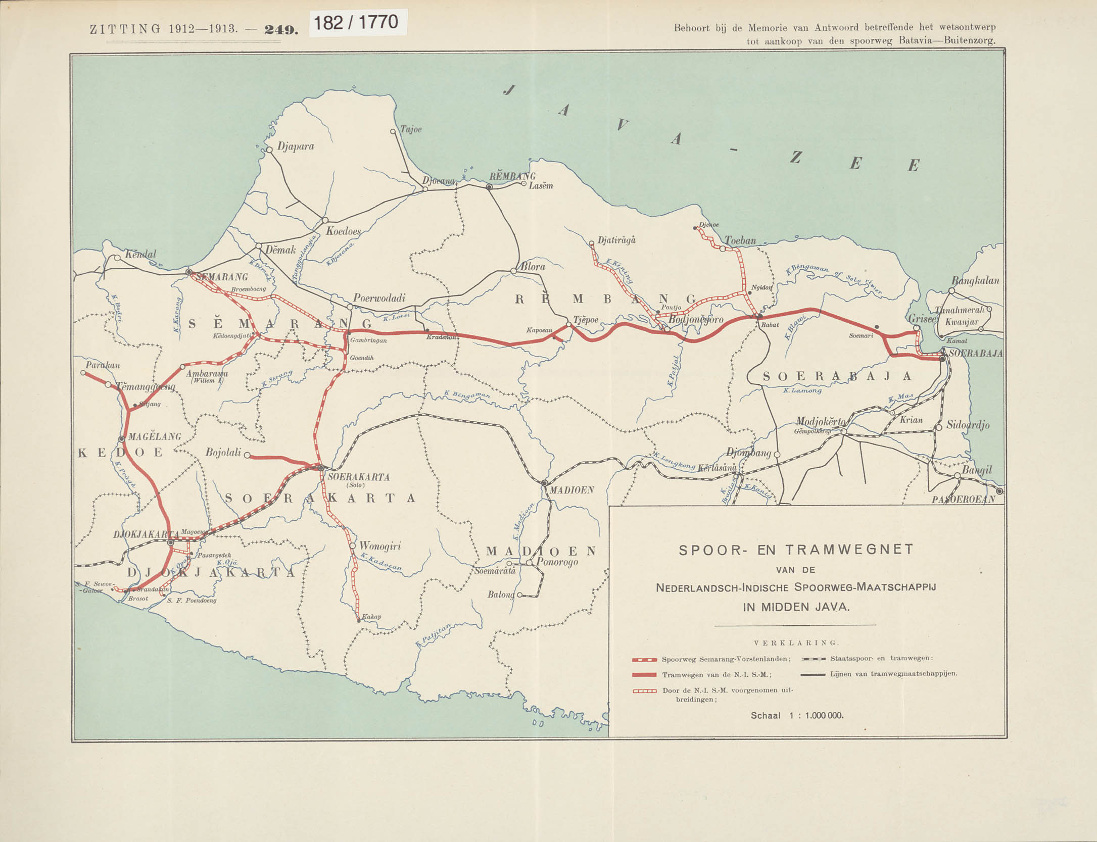 Op de kaart zijn ook ontworpen staatsspoorverbindingen ingetekend en zijn de diverse lijnen der maatschappijen van elkaar onderscheiden. Behoort bij de Memorie van Antwoord betreffende het wetsontwerp tot aankoop van den spoorweg Batavia-Buitenzorg